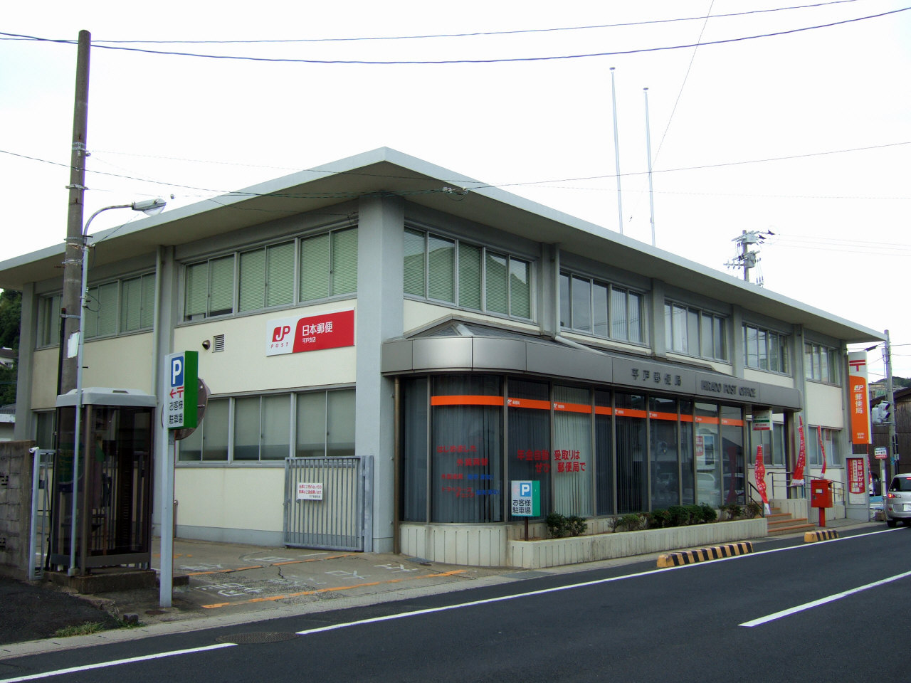 平戸郵便局（JP Hirado Postoffice）